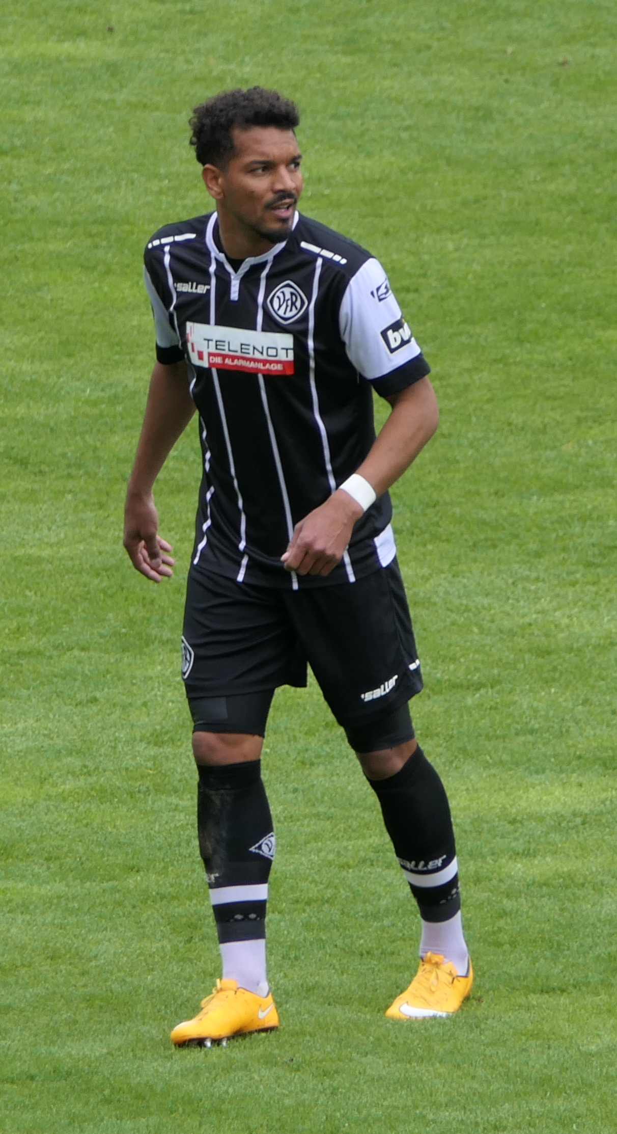 Der Fussballprofi Royal-Dominique Fennell im Trikot des VfR Aalen beim Heimspiel gegen Eintracht Braunschweig am 05.05.2019.